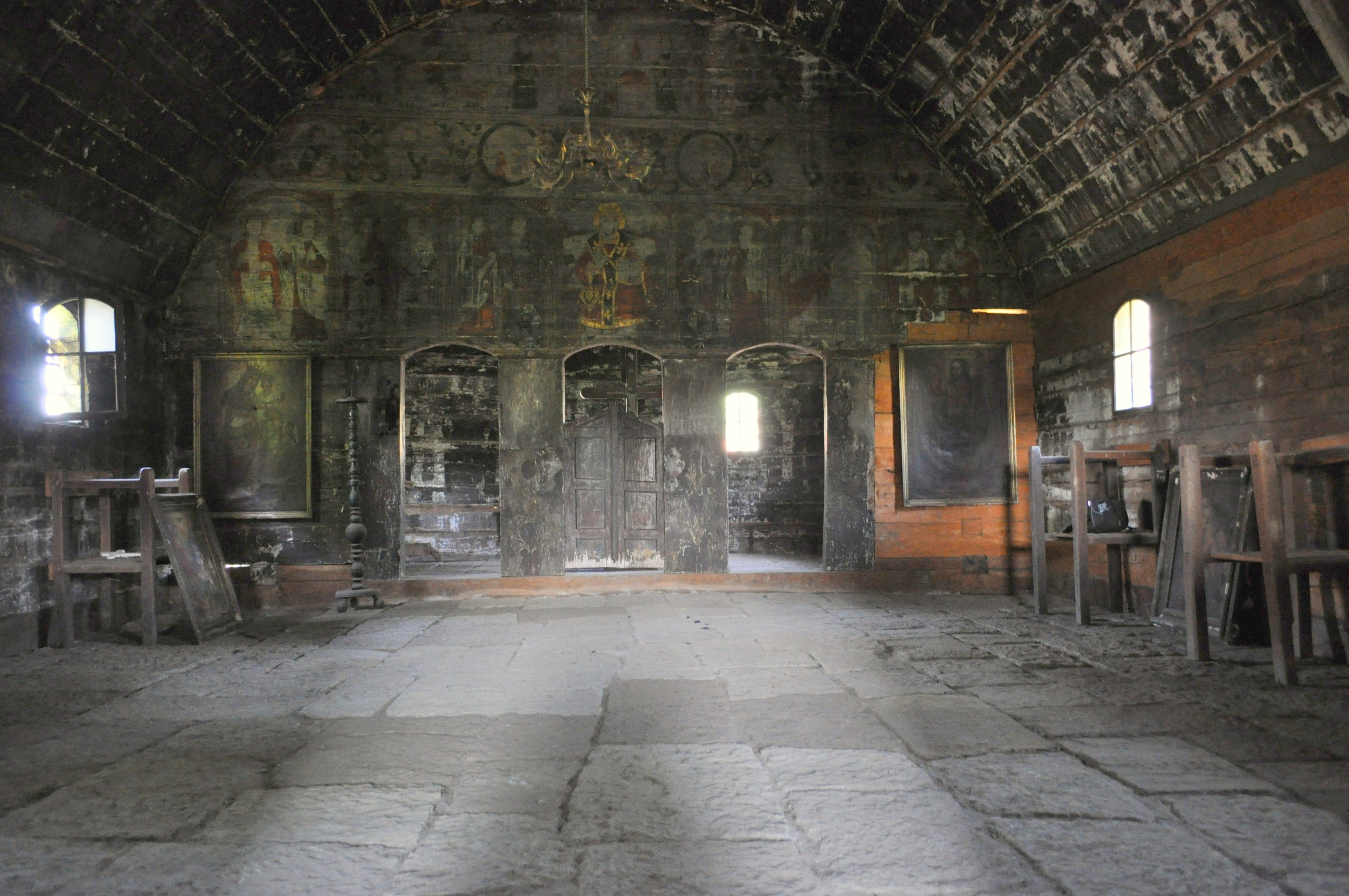 Biserica de lemn din Apahida, județul Cluj